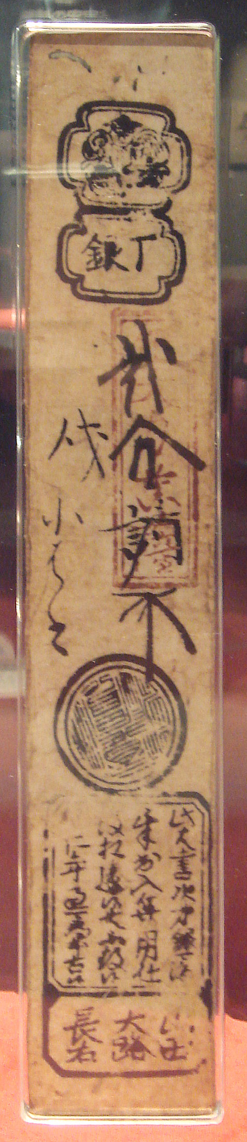 Yamada_Hagaki_first_Japanese_banknote circa 1600